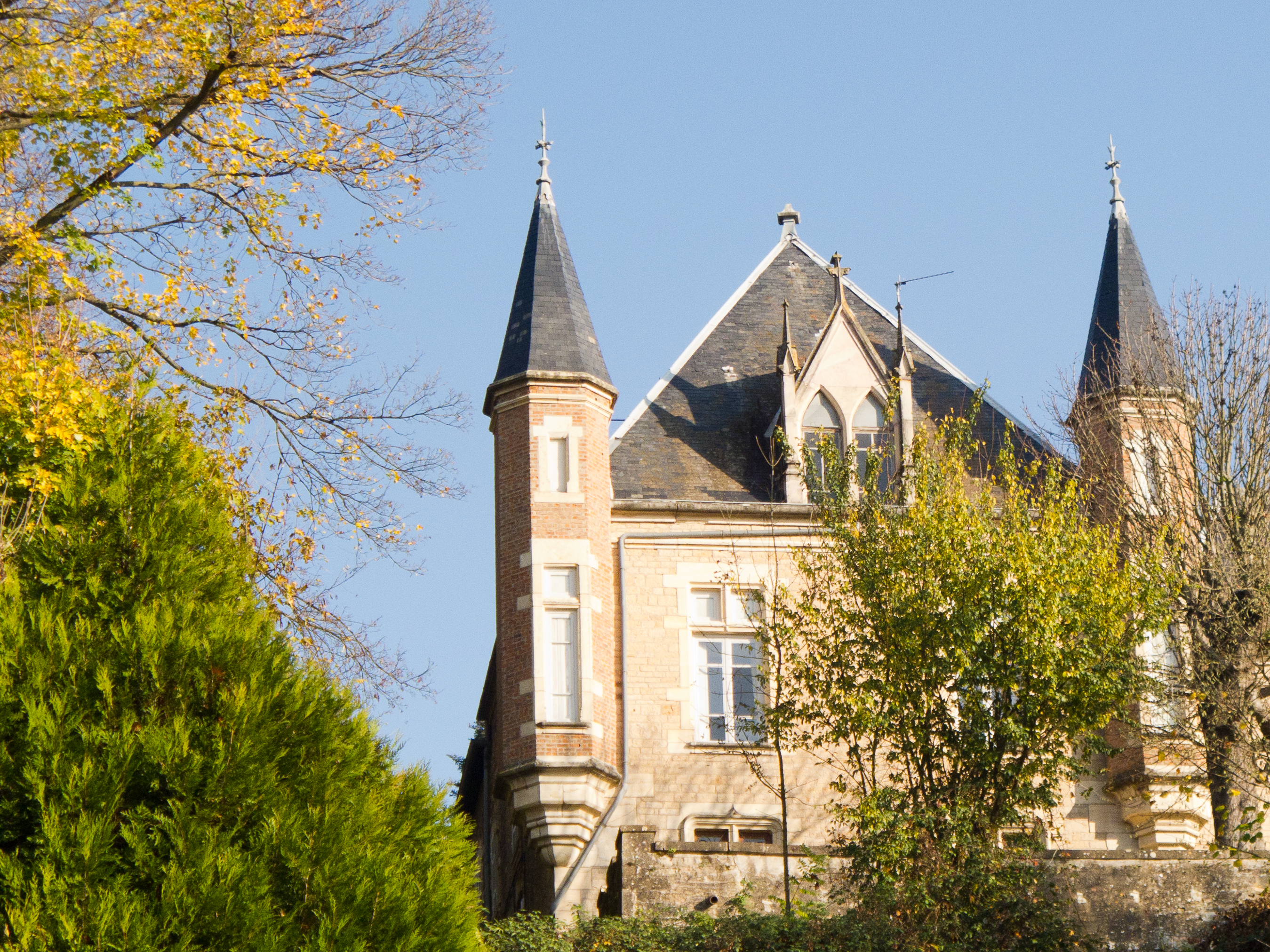 Chateau de Beauregard - Beauregard, Ain, France